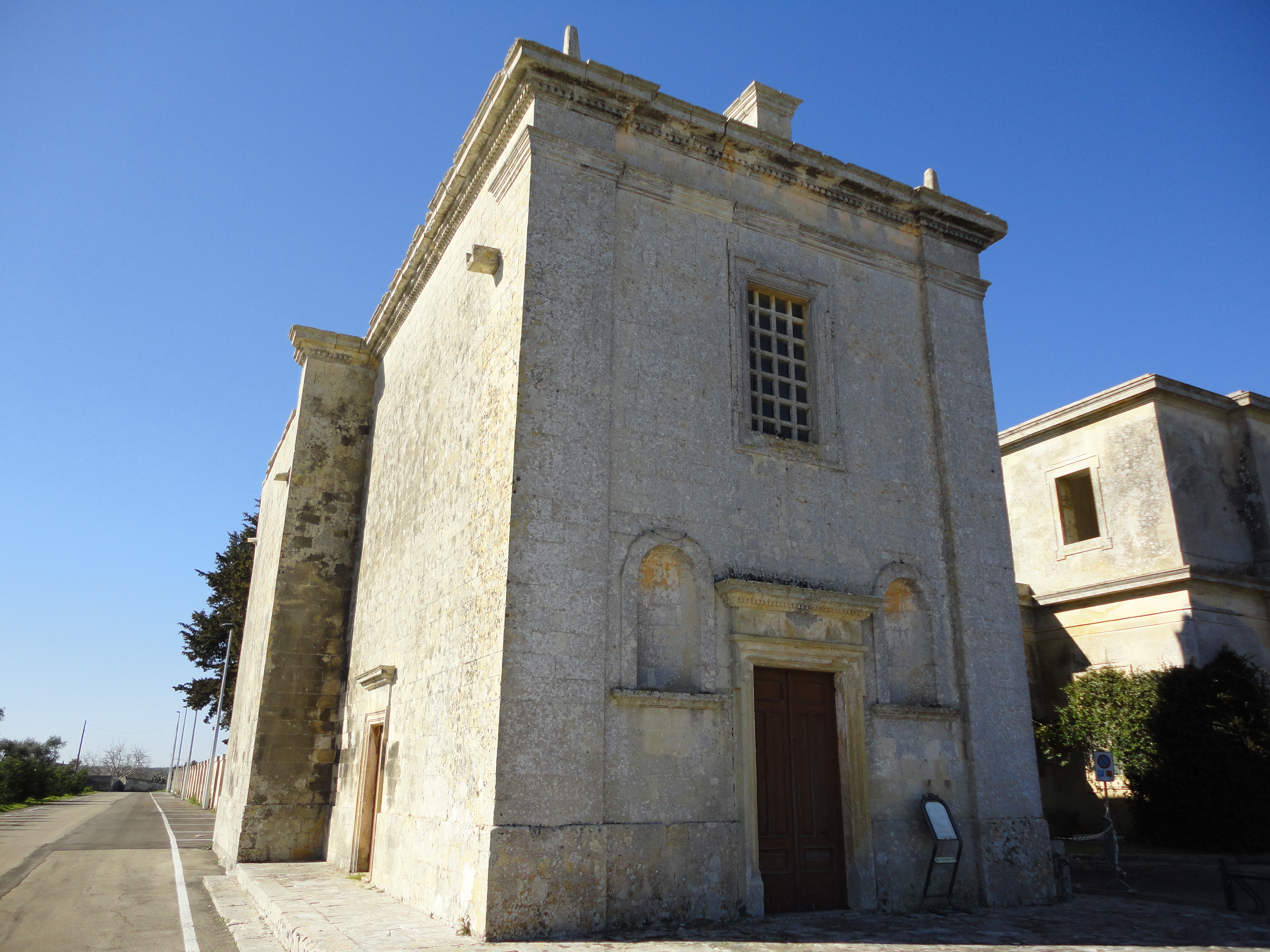 Chiesa Santa Maria Maddalena di Melpignano, Lecce